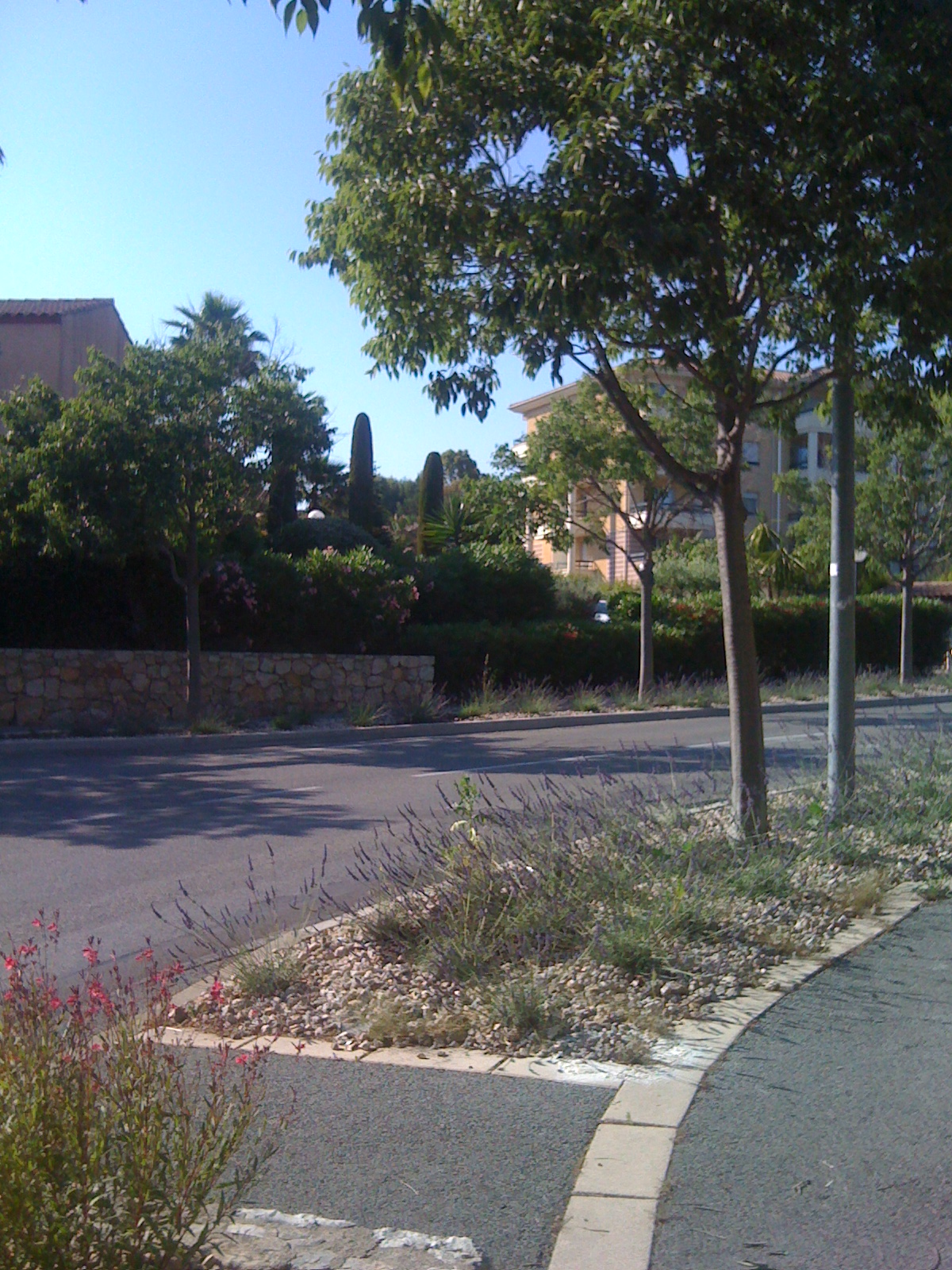 infrastructure